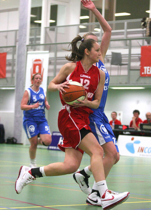 Heather Zurich